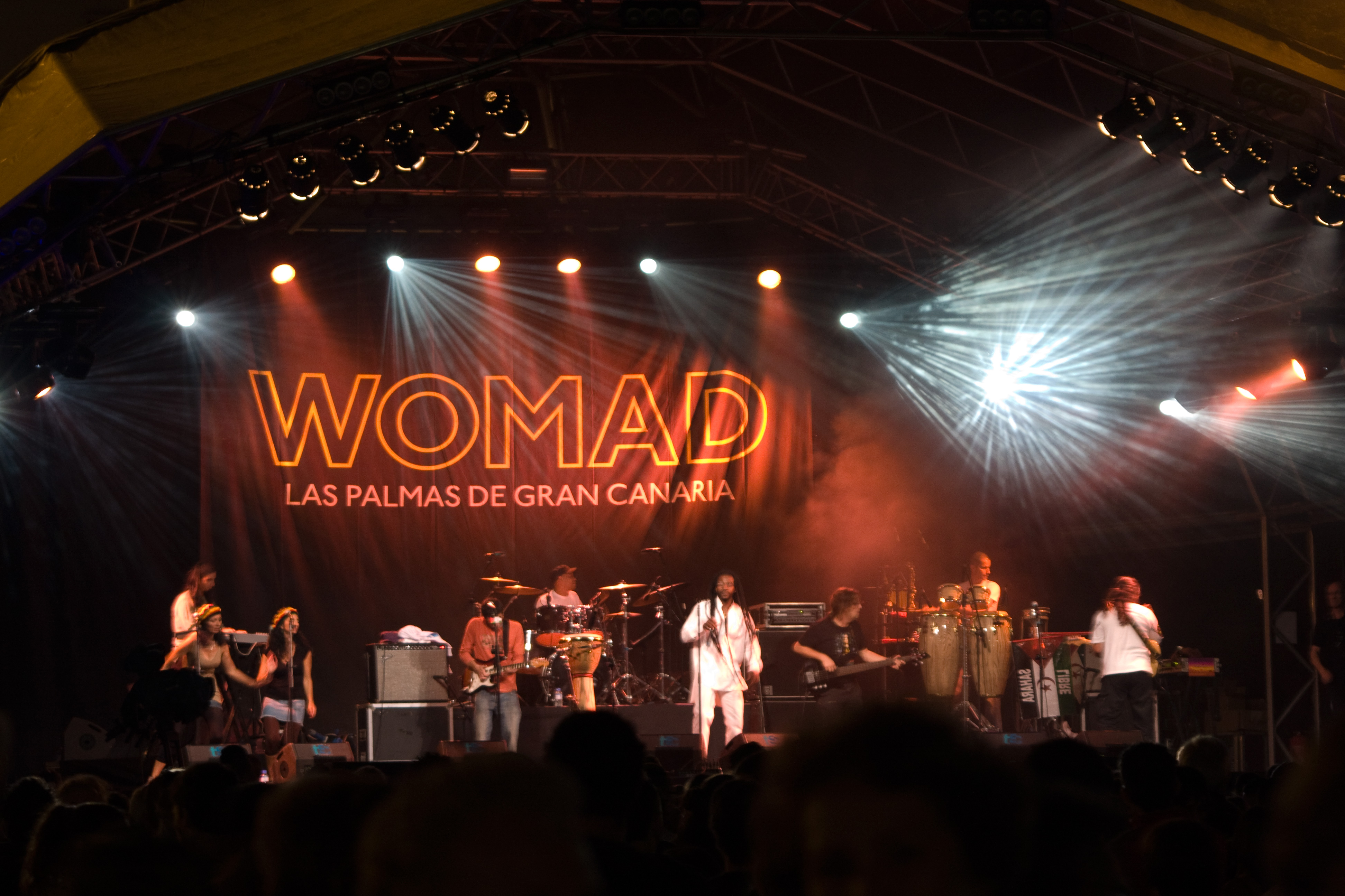 Festival WOMAD, en su edición de 2010 en la ciudad de Las Palmas de Gran Canaria.